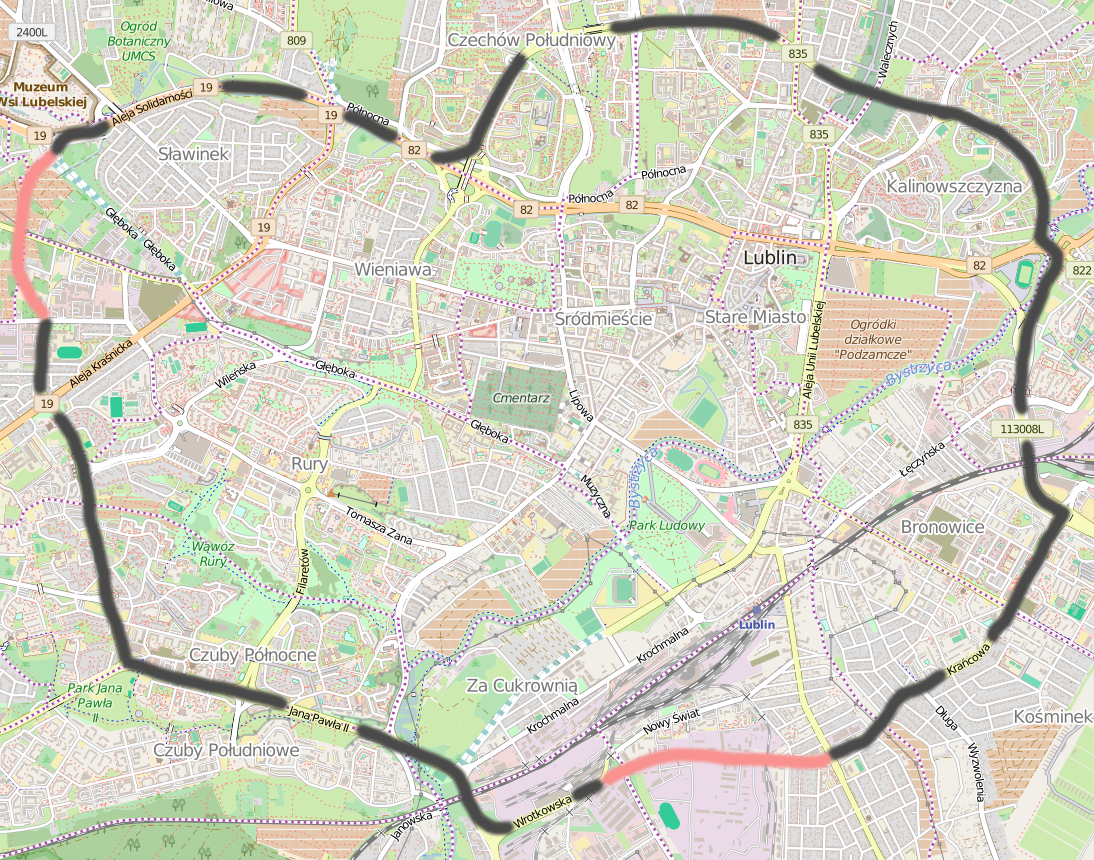 Koncepcja obwodnicy miejskiej Lublina, dane na 2015 r.